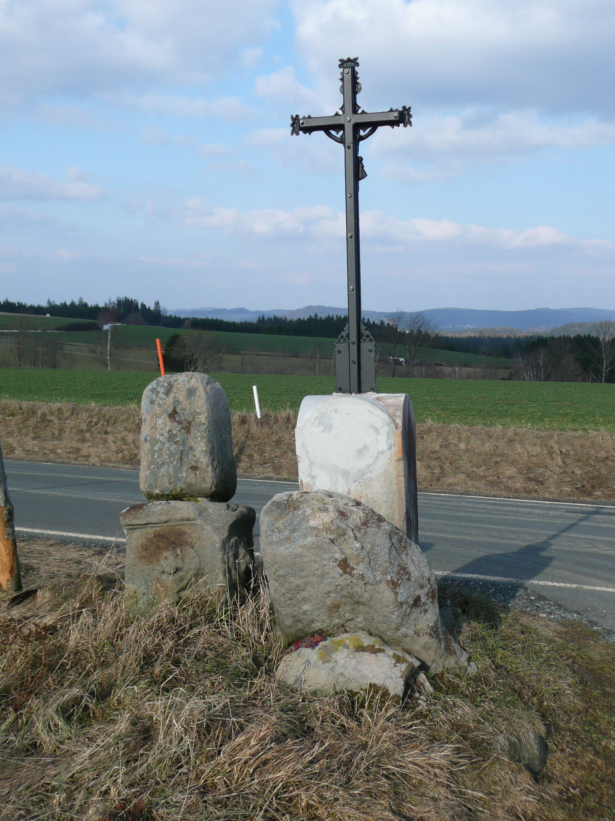 D-4-77-148-45